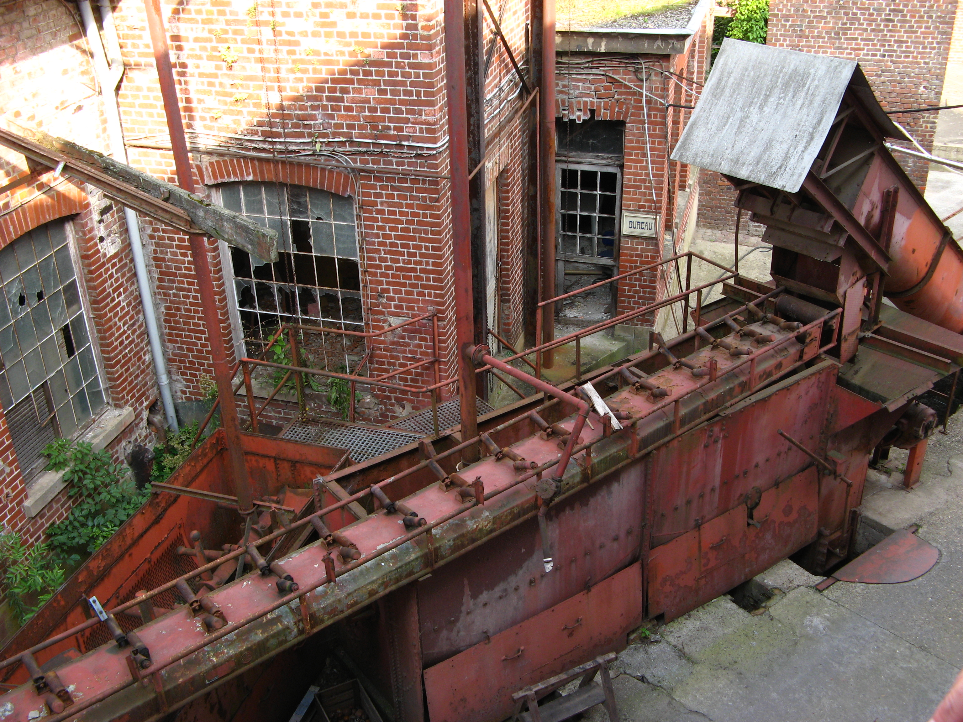 Borgloon, Stoomstroopfabriek, installaties